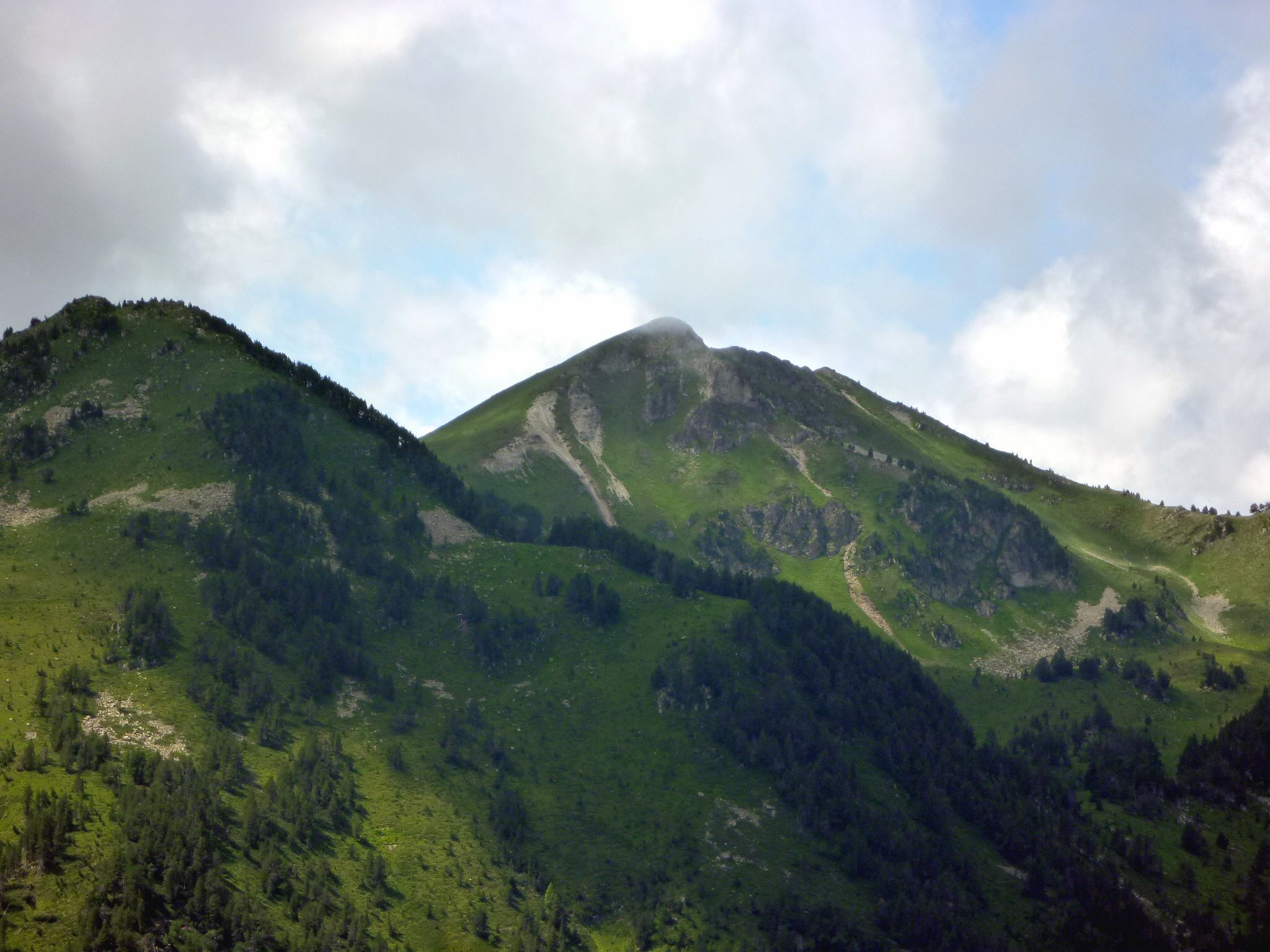 Tuc de Sendrosa a Naut Aran (Val d'Aran), a la zona perifèrica del Parc Nacional de Sant Maurici